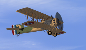 Breguet XIV version militaire, image de synthèse